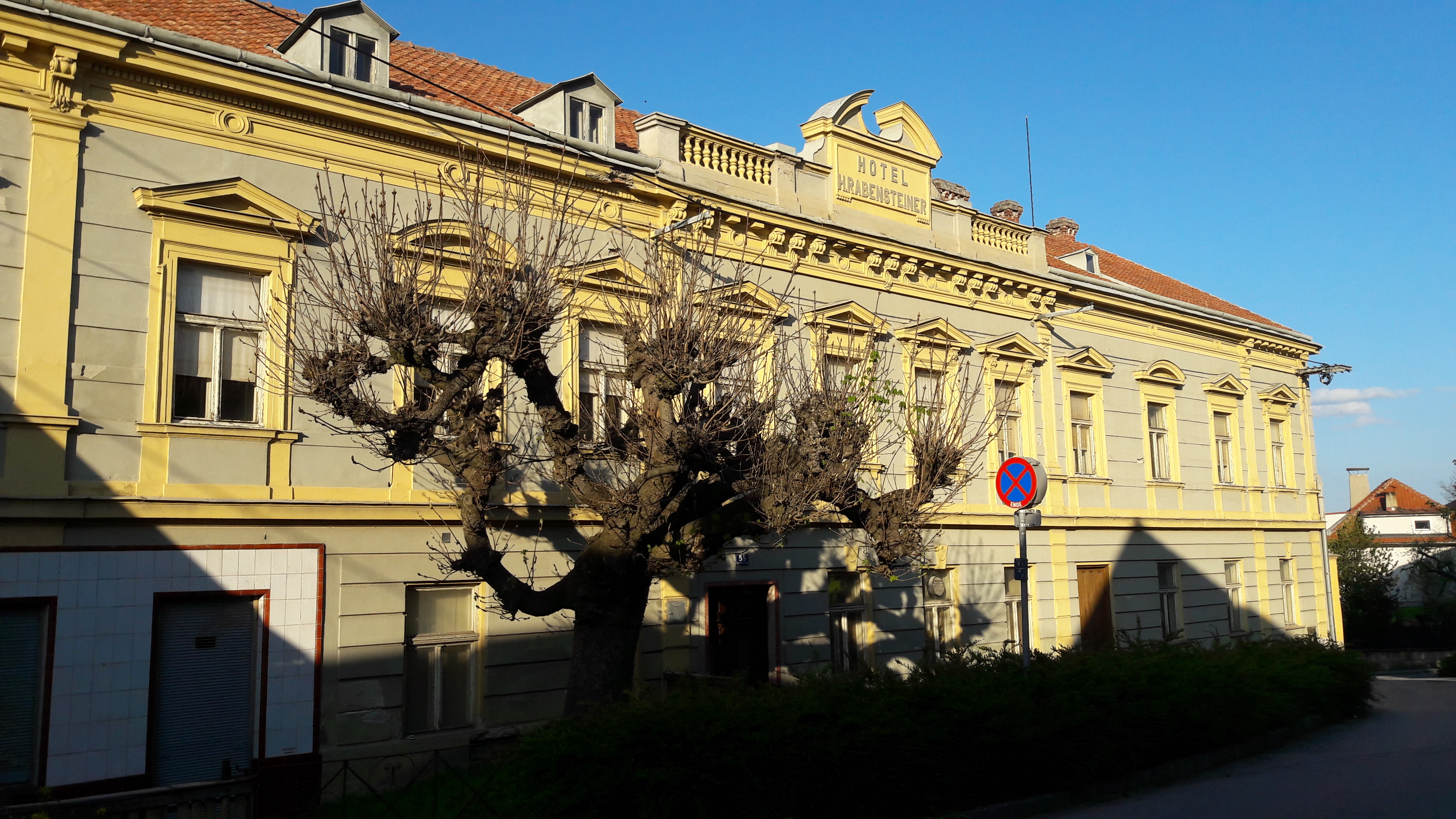 Ehemaliges Hotel in Pottschach, steht seit Jahren leer.